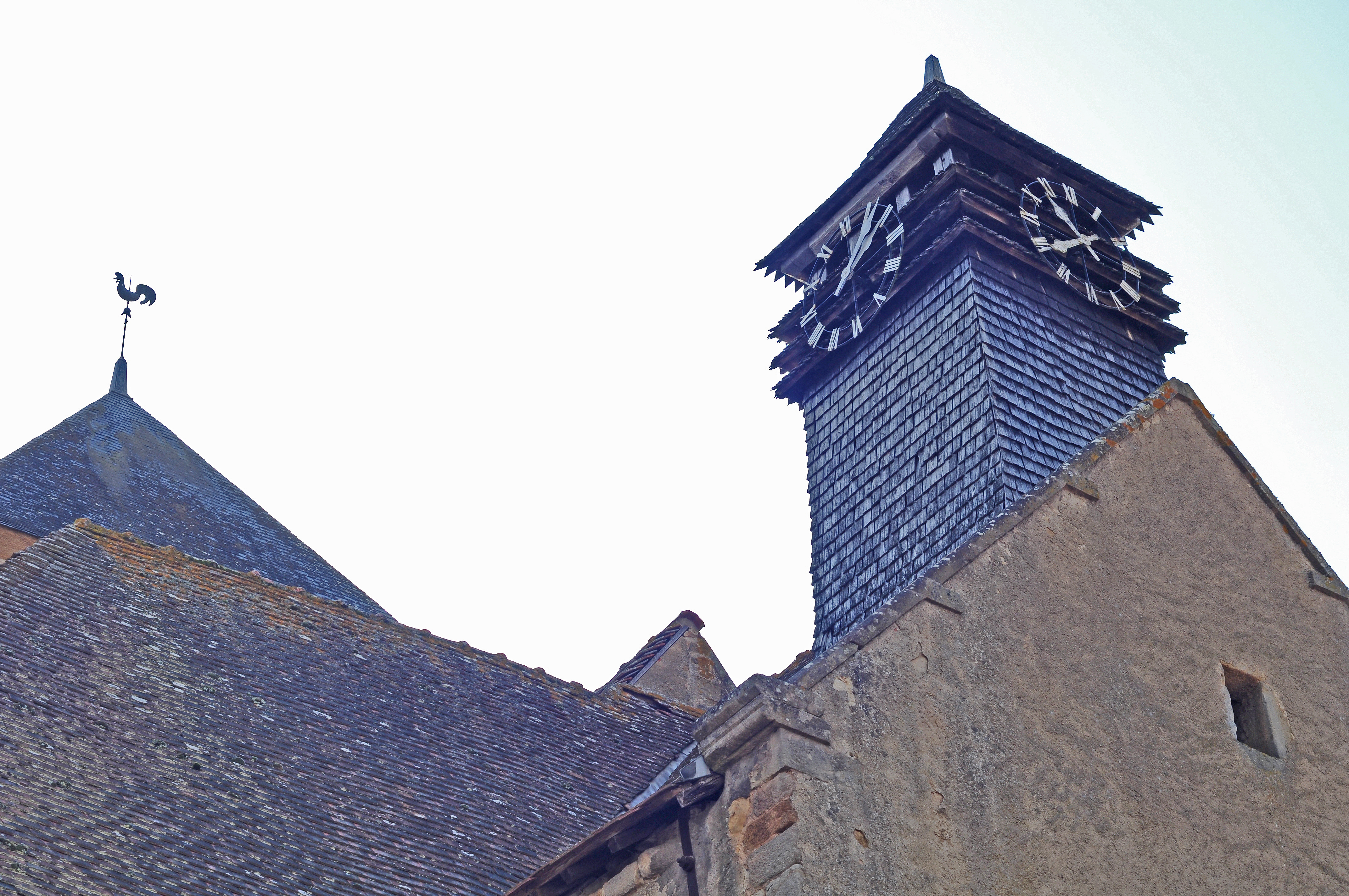 Cette horloge est recouverte de bardeaux de bois de châtaignier Ces derniers furent remplacés il y a environ soixante ans au début des années 1950. Leur durée de vie sera encore de plusieurs décennies.